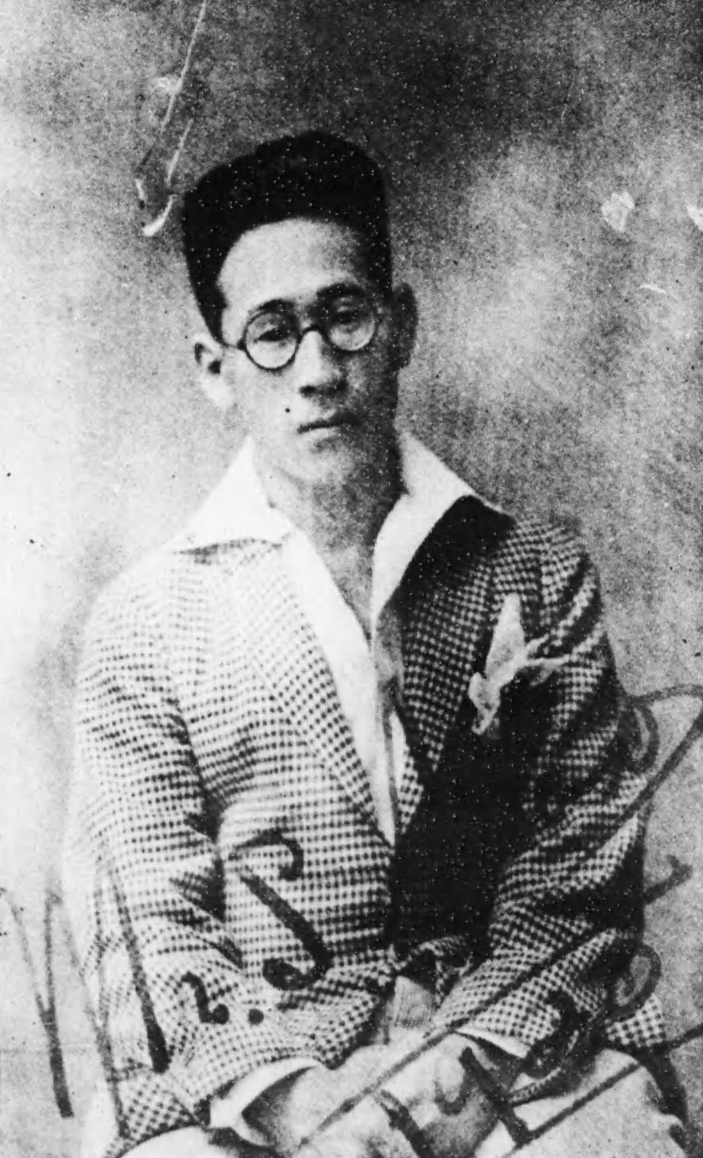 1920年の写真。